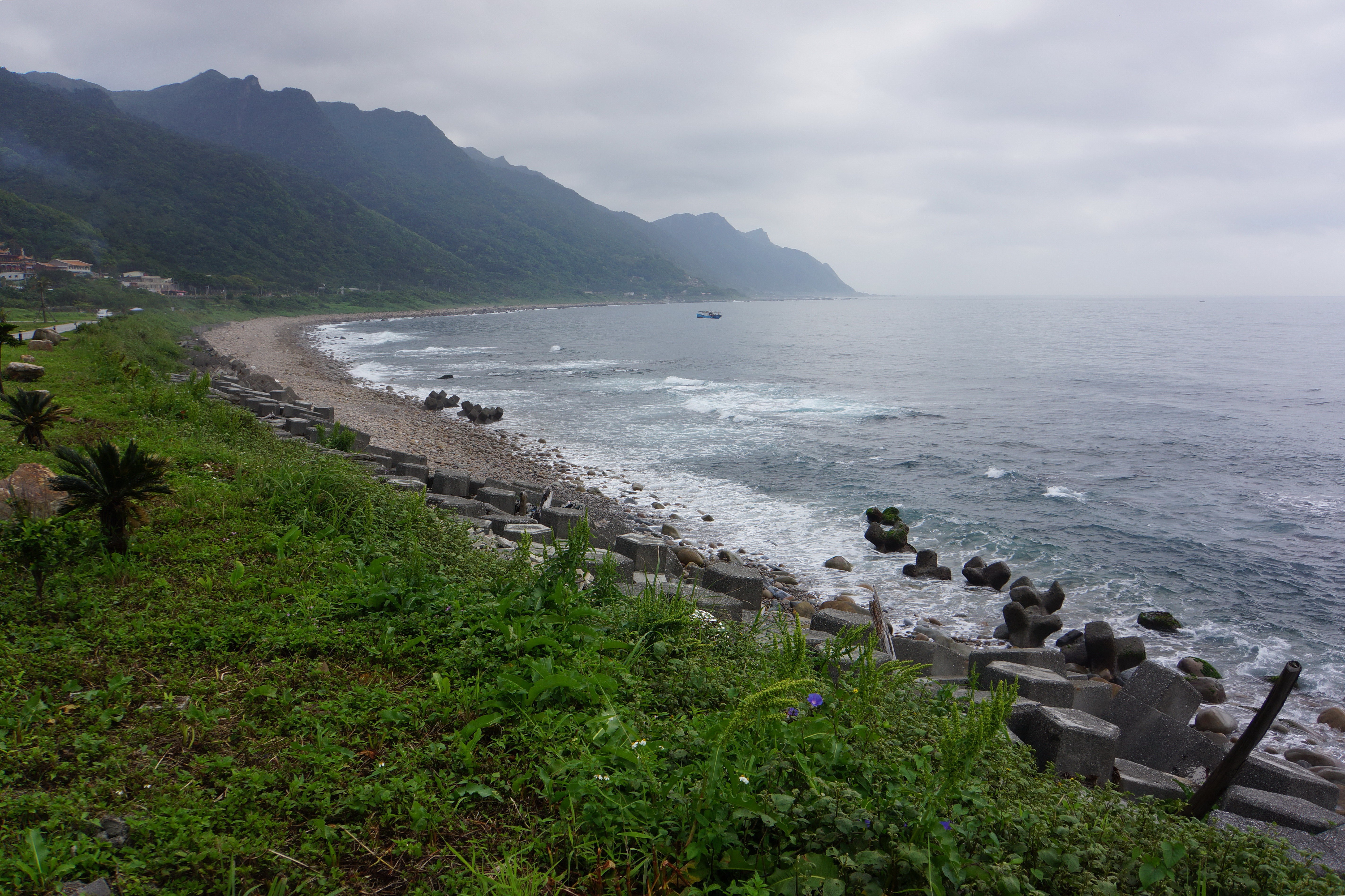 View toward Cape San Diego 眺望三貂角